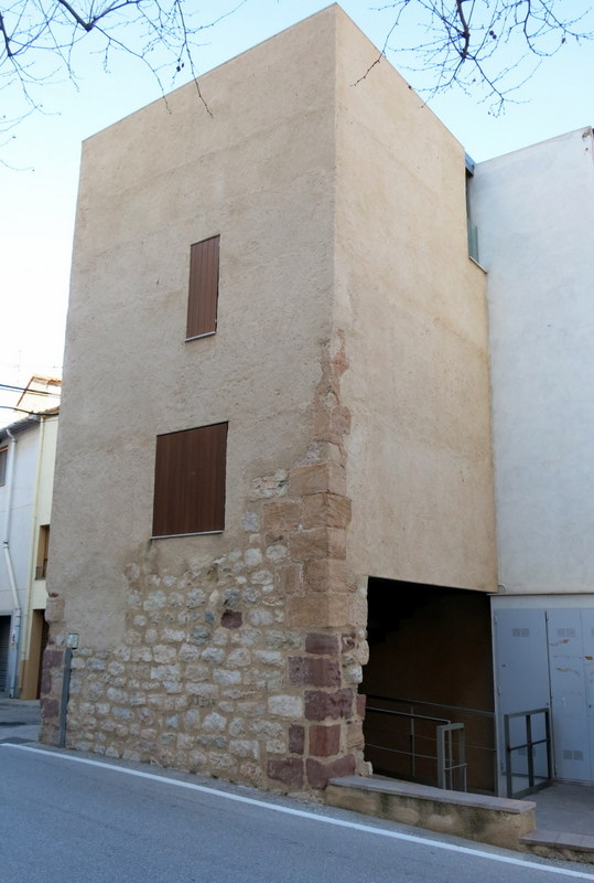 torre de Ca Tatxó, a Alcover comarca de l'Alt Camp - Catalunya